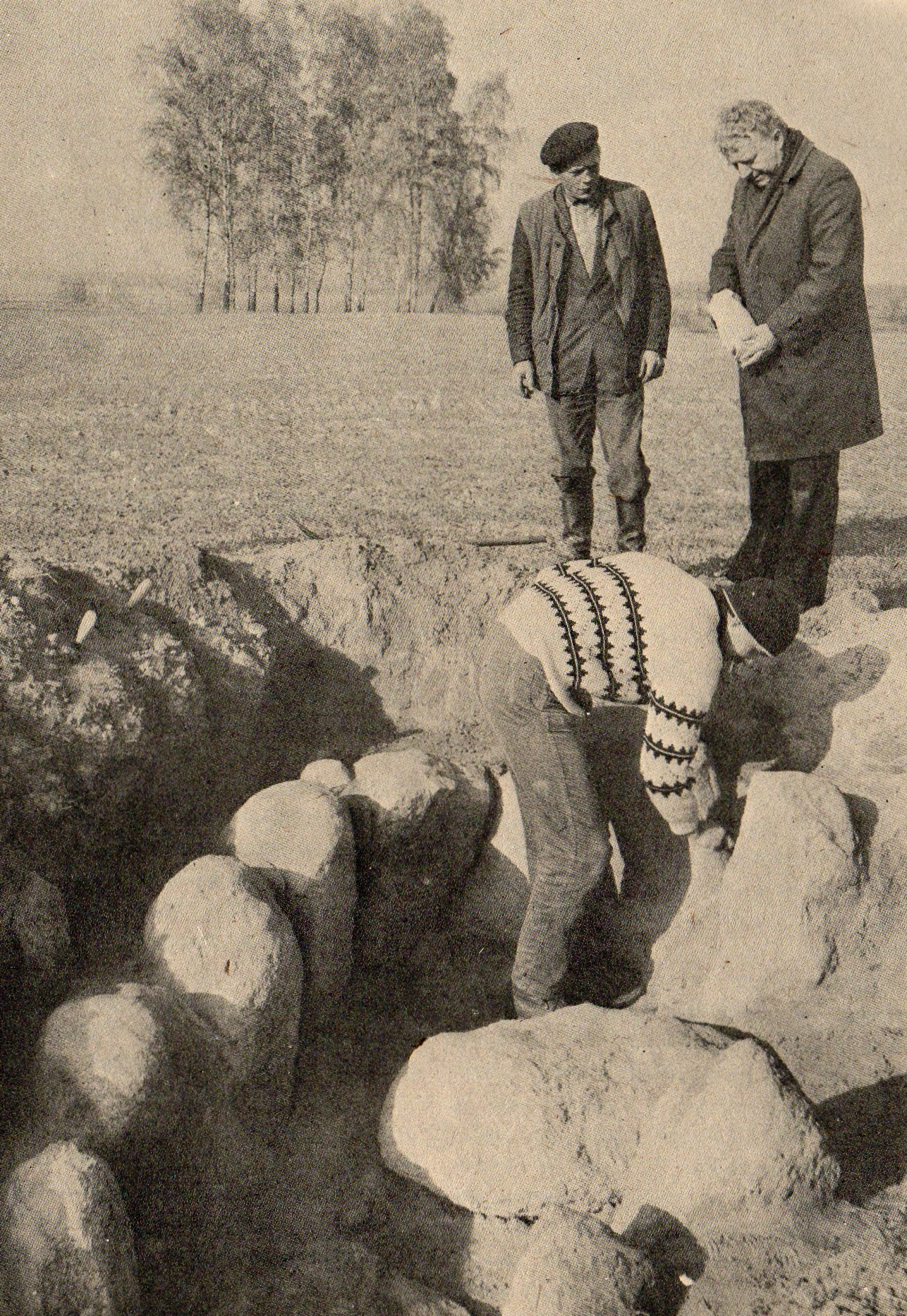 Grobowiec neolityczny w Srebrnej, pow. płoński. Odkrywca - rolnik Grzegorz Wiśniowski. Październik 1982r.